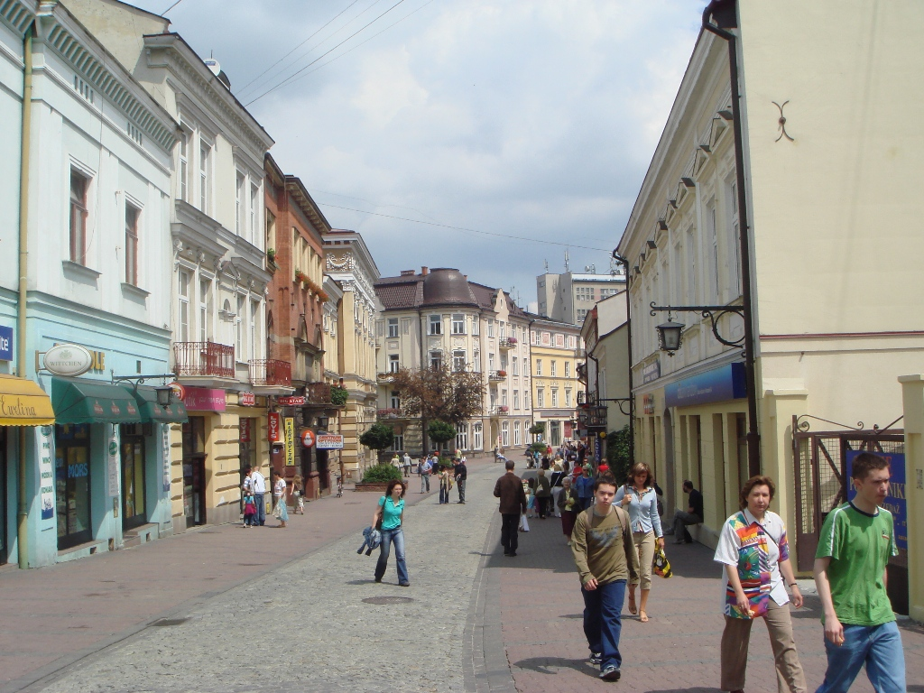 La rue Wałowa est l'artère commerçante de Tarnów. Ici, une vue en été.